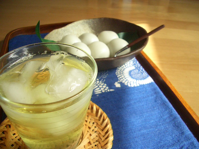 今日のおやつは、冷たい緑茶とおだんご♪